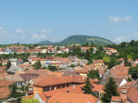 Roofs of Eger